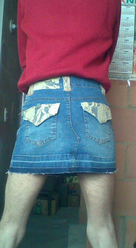 Son más usadas que los mismos jeans.